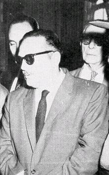 Cuban President Manuel Urrutia in 1959.